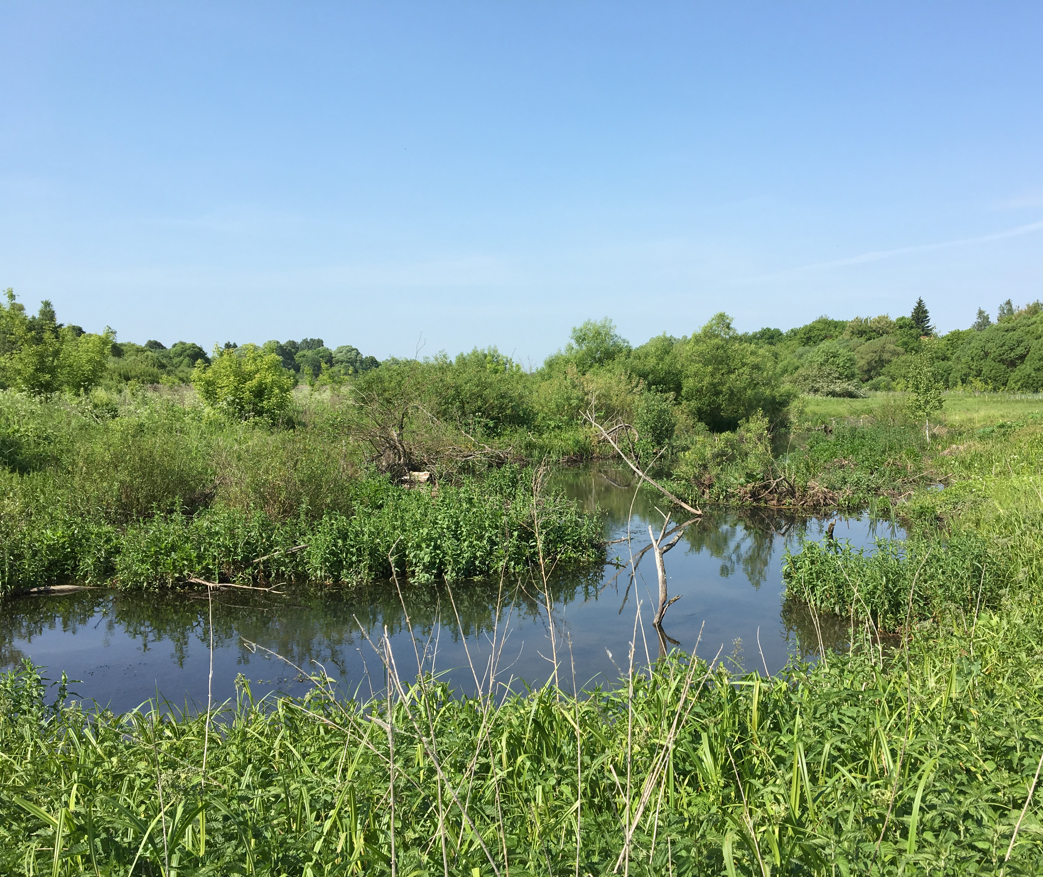 Река Общерица в селе Соломино